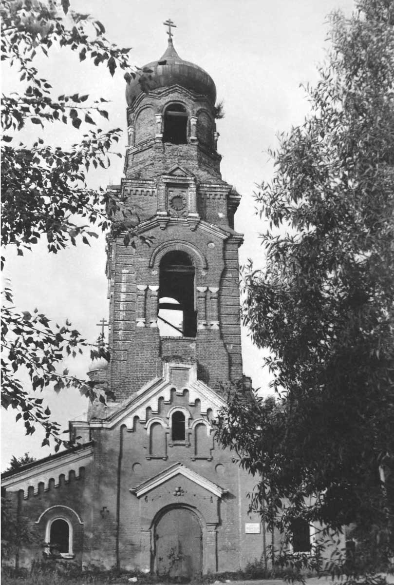 (Москва и Московская область, Дмитров, Профессиональная улица, 65)